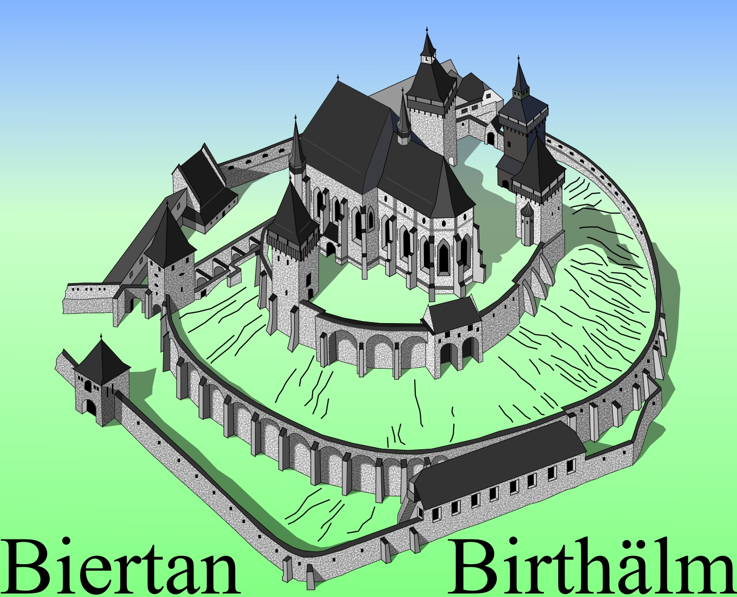 Biserica fortifcata din Biertan